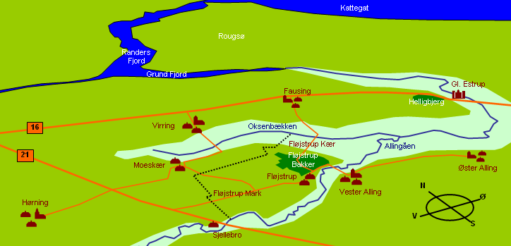 Panoramaskitse over Fløjstrup Bys placering. Vest for kortet, hvor primærruterne 16 og 21 mødes ligger Assentoft, og øst for kortet, ved Gl. Estrup, ligger Auning. Den stiplede linje viser grænsen for ejerlavet for Fløjstrup By.